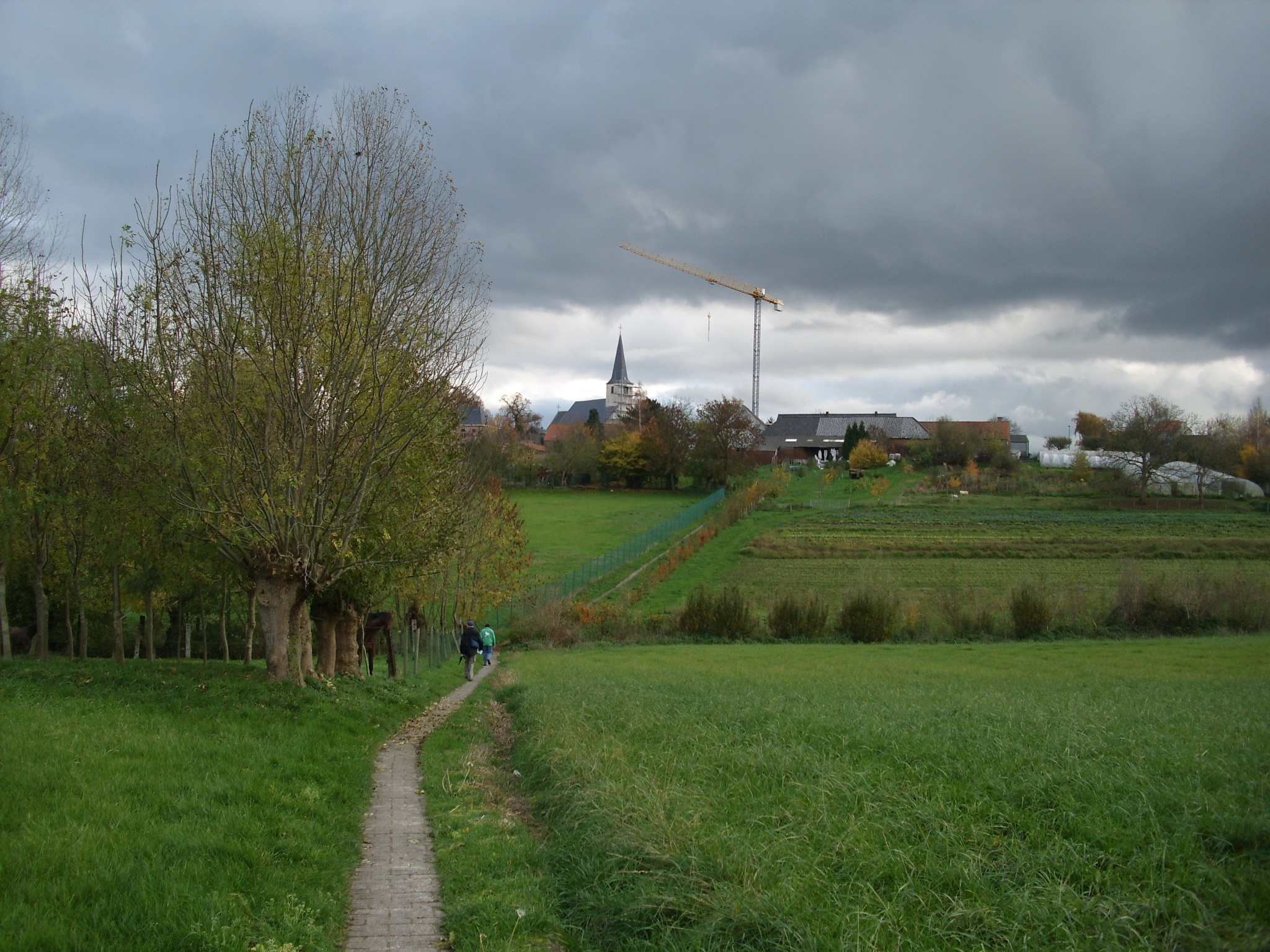 Sint-Kornelis-Horebeke - Horebeke - Oost-Vlaanderen - Vlaanderen - België. De Ketse, het wandelpad dat de beide deelgemeenten van Horebeke met elkaar verbindt.